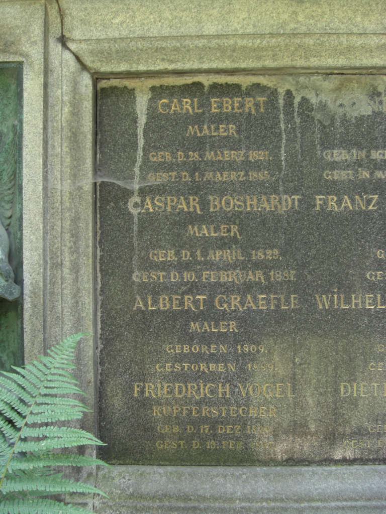 Grab des Schweizer Historienmalers Johann Caspar Bosshardt (1823-1887) auf dem Alten Nördlichen Friedhof in München